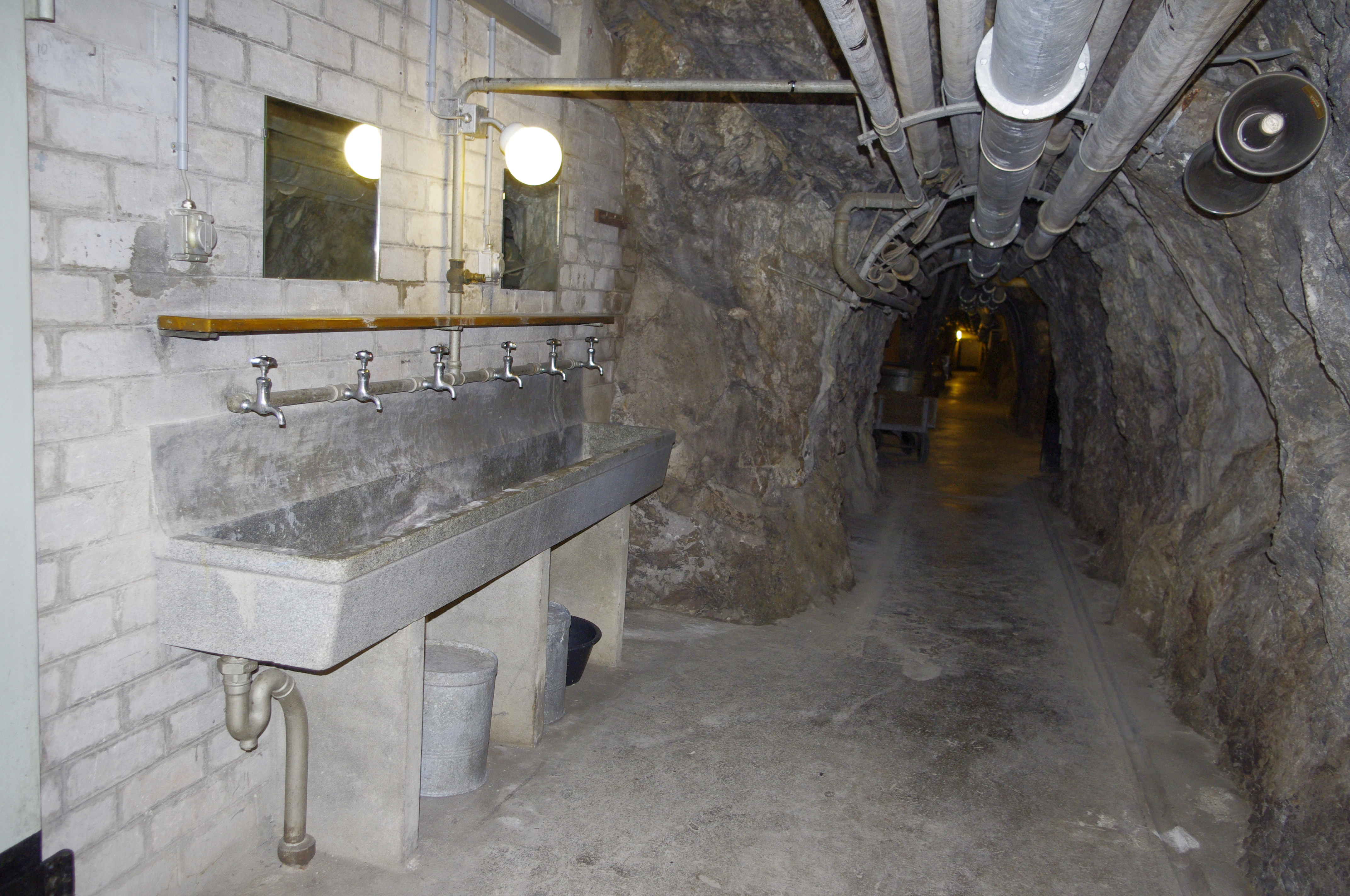 Fort Cindey, Waschbecken im zentralen Gang